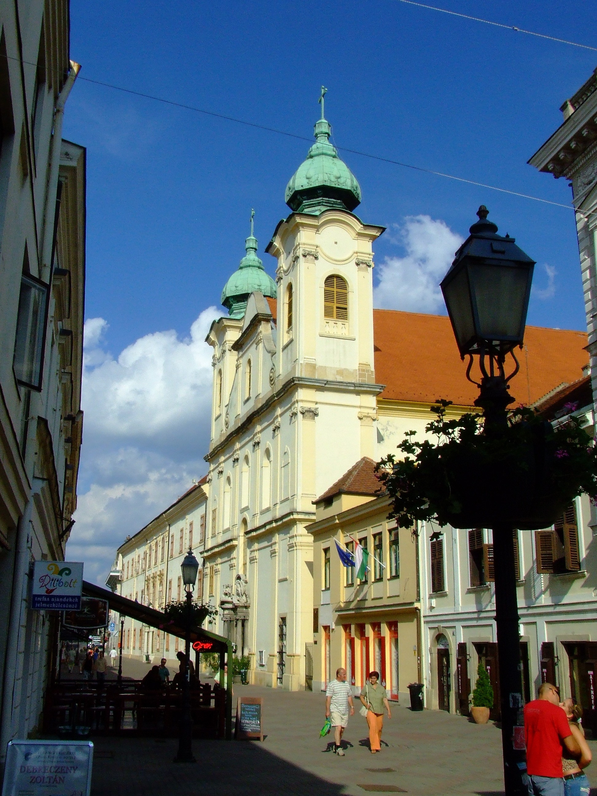 A Lyceum templom (egykori pálos templom) Pécsen. Épült 1741 és 1756 között Vépi Máté pálos szerzetes tervei szerint